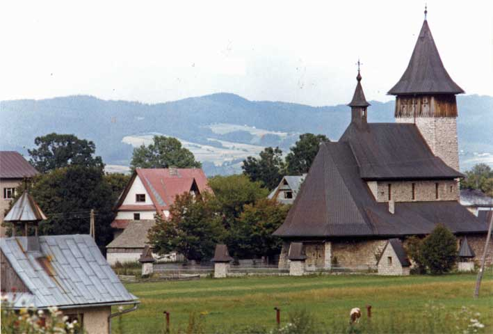 Bukowina Tatrzańska - kościół parafialny p.w. Najświętszego Serca Jezusowego Foto gemaakt op 27 augustus 1993 (gedigitaliseerd 17 november 2006).